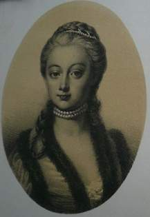 Marie Eleonora z Lichtenštejna​ (7. července 1745, Oettingen–26. listopadu 1812, Vídeň).